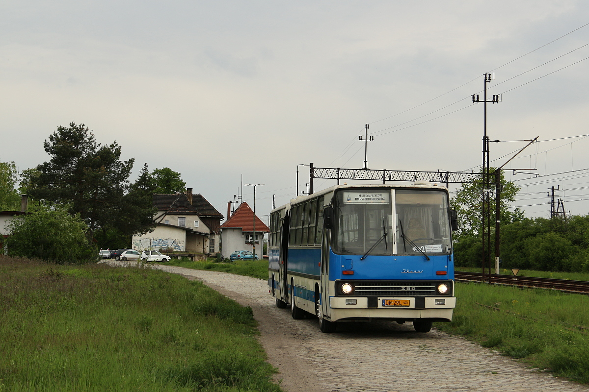 Ikarus 280 w Czernicy Wrocławskiej